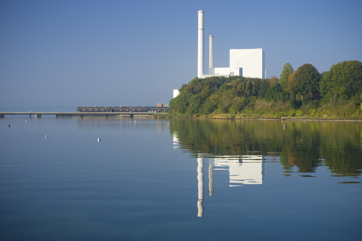 Skærbækværket